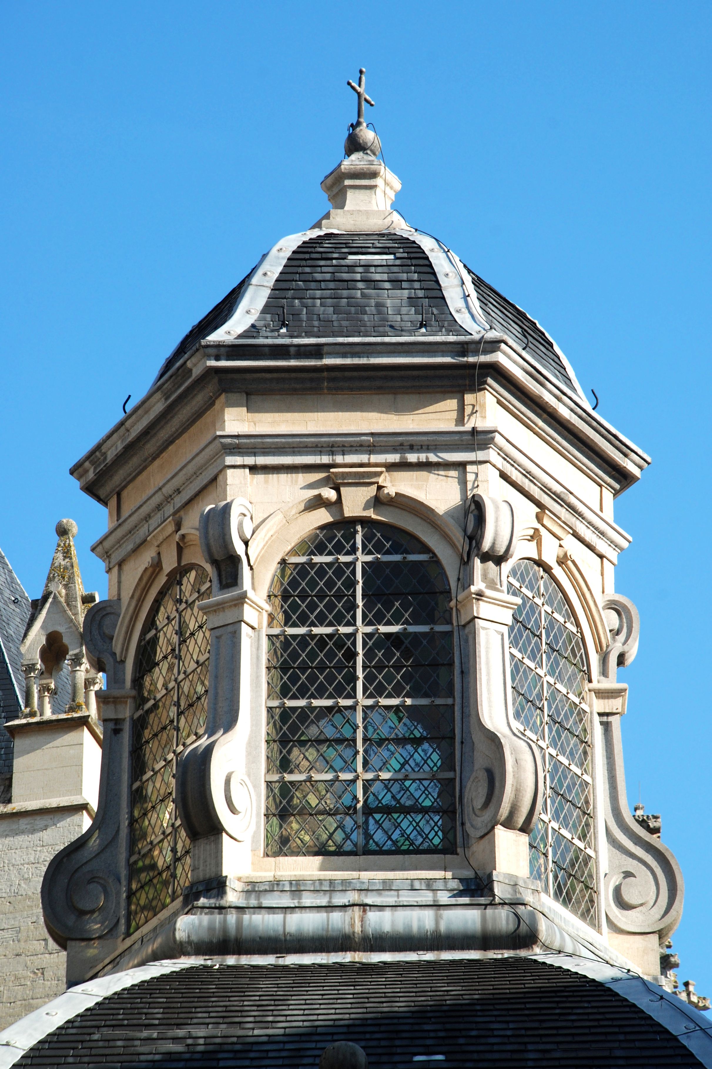 Belgique - Bruxelles - Cathédrale Saints-Michel-et-Gudule de Bruxelles - Chapelle Maes